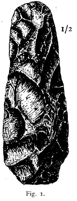 Dessin reproduisant une hache paléolithique retrouvée à 200 m du menhir de la Pierre de la Joure à Saint Ouen d'Attez. Extrait de l'article de Georges Poulain "Le menhir de Saint-Nicolas-d’Attez et description d’instruments en silex trouvés dans la contrée" paru dans le Bulletin de la Société normande d’études préhistoriques en 1902